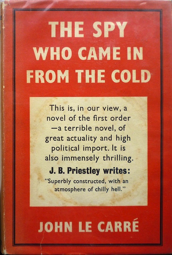 Обложка романа Ле Карре "Шпион, вернувшийся с холода"